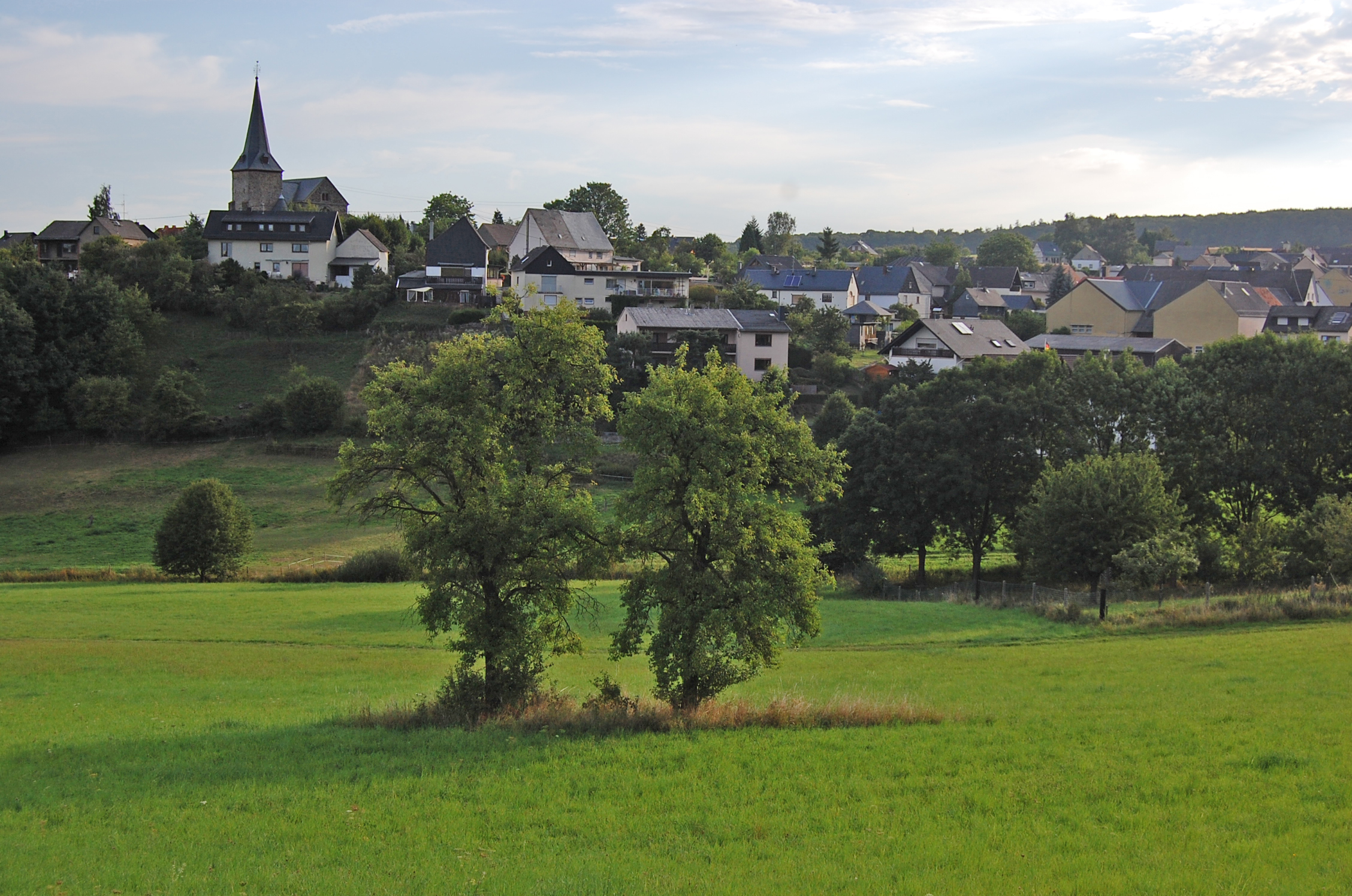 Schoenborn (Rhein-Lahn-Kreis)